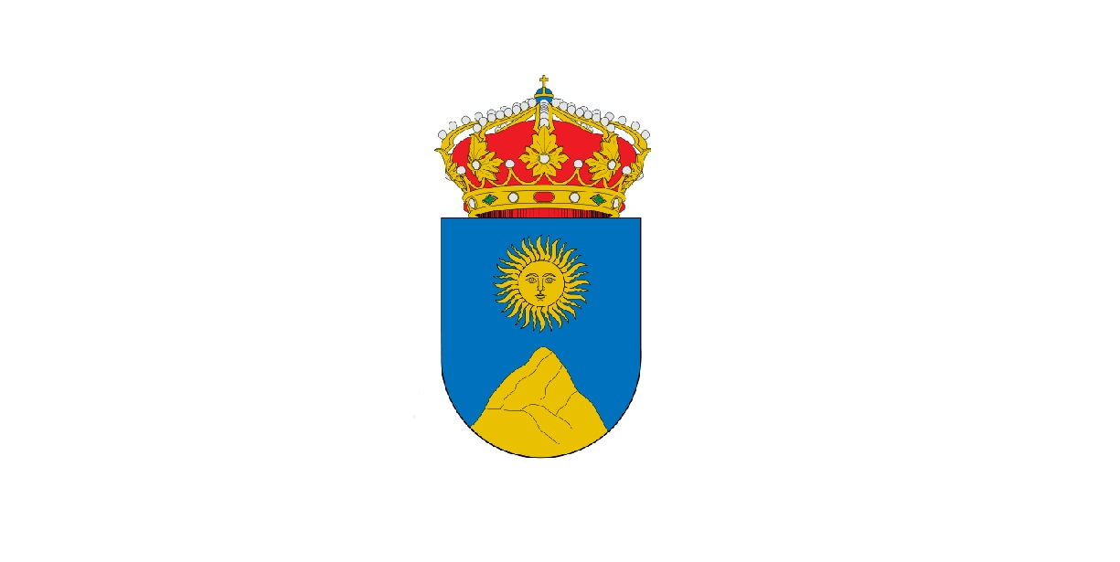 Escudo municipal de Montehermoso (Cáceres, España): En campo de azur (azul), un monte, de oro, surmontado de un sol, del mismo metal. Al timbre, corona real cerrada. [1]